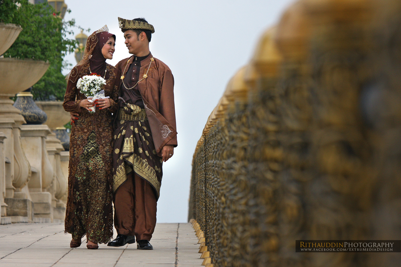 076_WanAlbum (2)